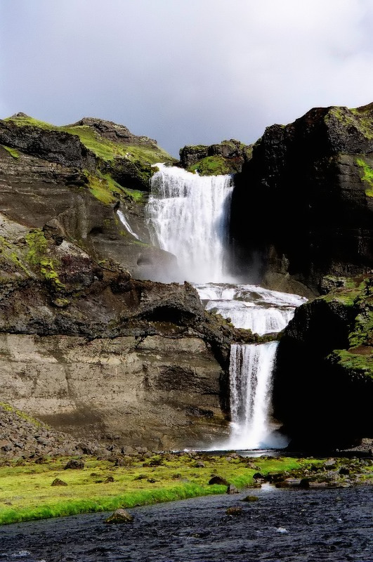 Ofaerufoss (Islande)